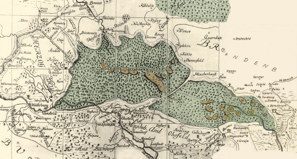 Zeichnung des Drömlings von 1737 mit dem Titel: Wahrer Uhrsprung und Lauff des Ohra Flußes samt dem Drömling und accuraten Gräntzen der Altmark Lüneburg, Braunschweig und Magdeburg Angefertigt vom Magdeburger Schulrektor und Heimatchronisten Samuel Walther (Pastorensohn aus Wegenstedt am Drömling). Historische Zeichnung, vom Benutzer:Axel Hindemith mit Fotoprogrammen nachbearbeitet.